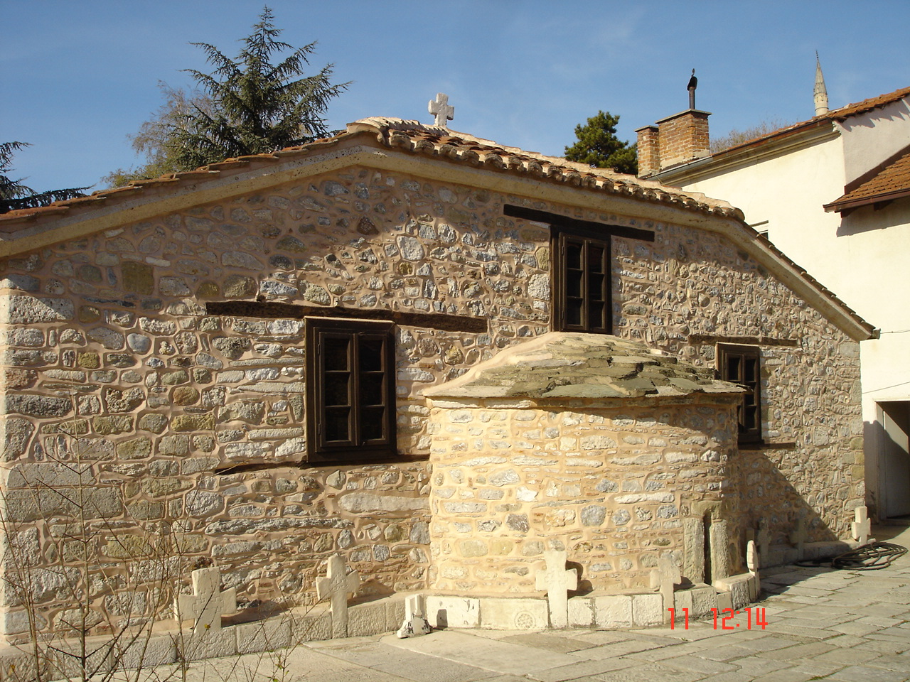 Поглед на источниот ѕид на црквата Свети Спас